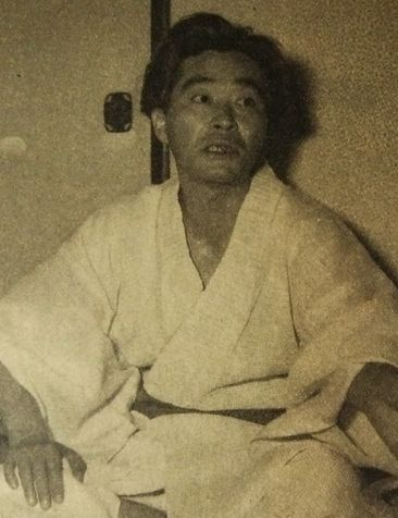 板谷四郎